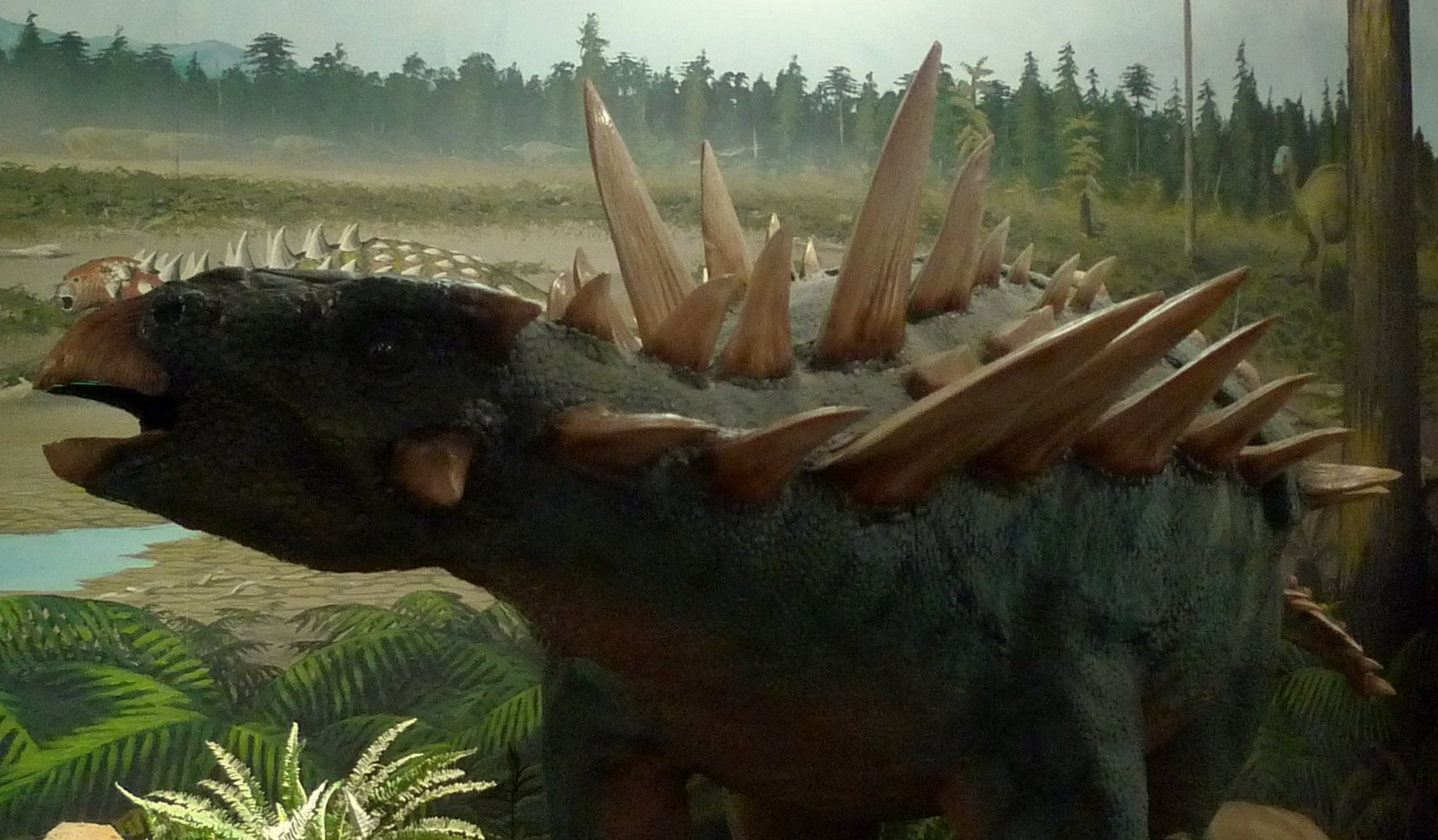 A Dinosaur